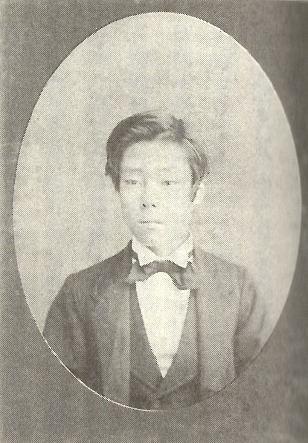 高倉永則の肖像写真。